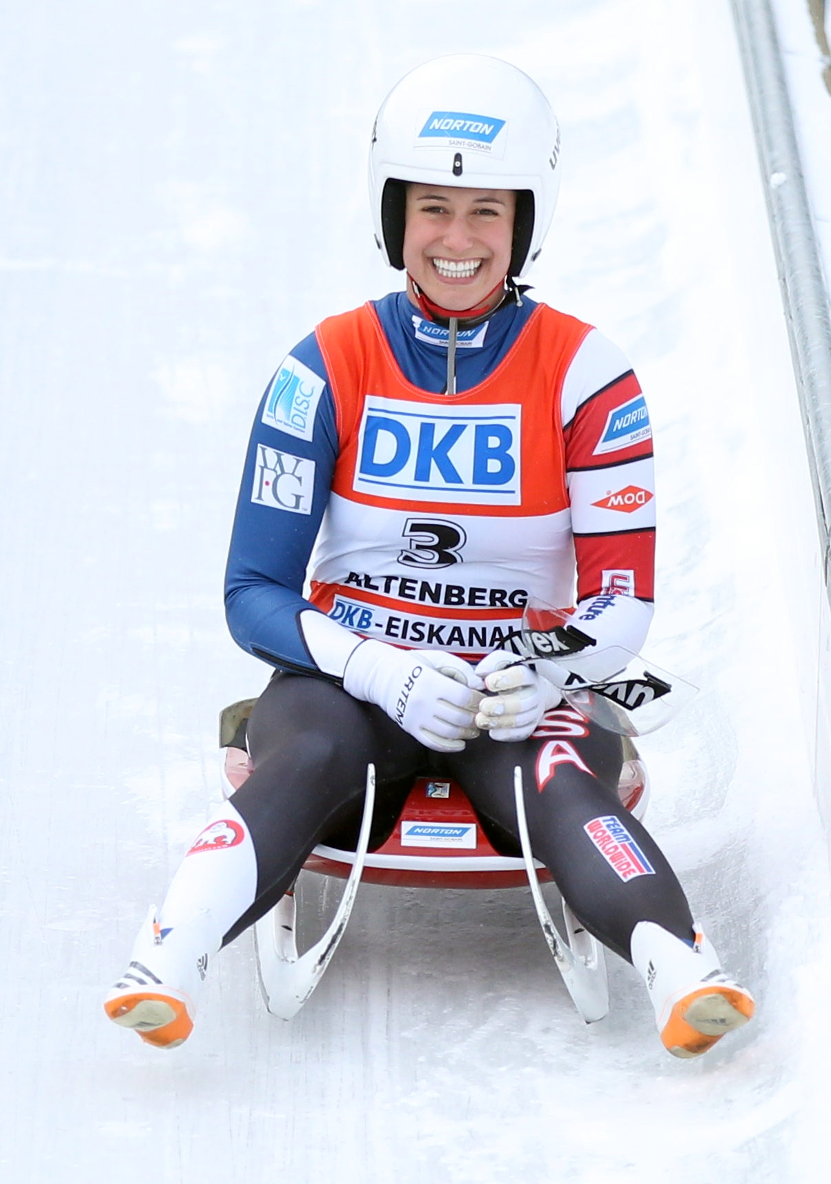 Emily Sweeney beim Nationencup-Rennen der Frauen in Altenberg 2017